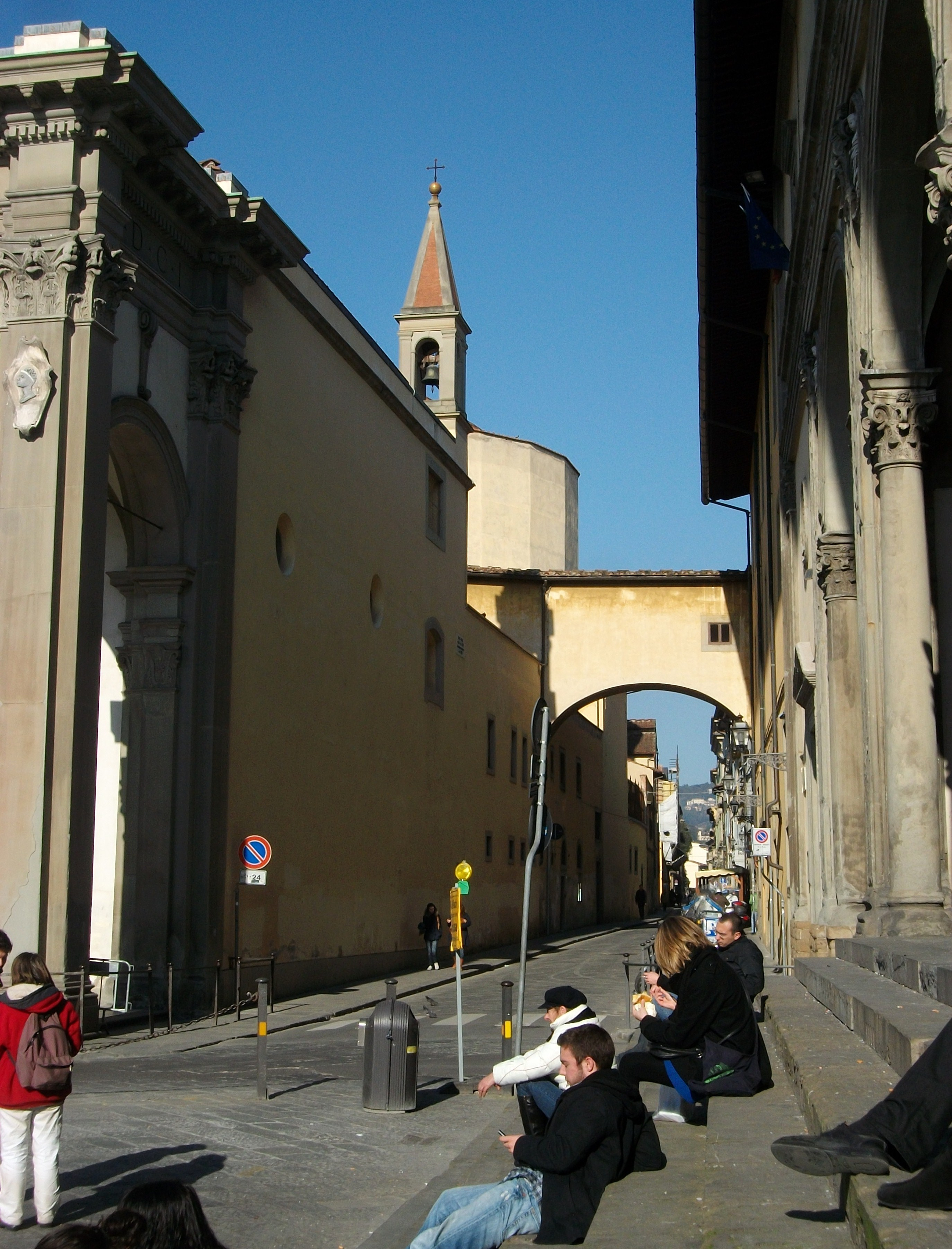 Via Gino Capponi des de la Piazza Santissima Annunziata de Florència.